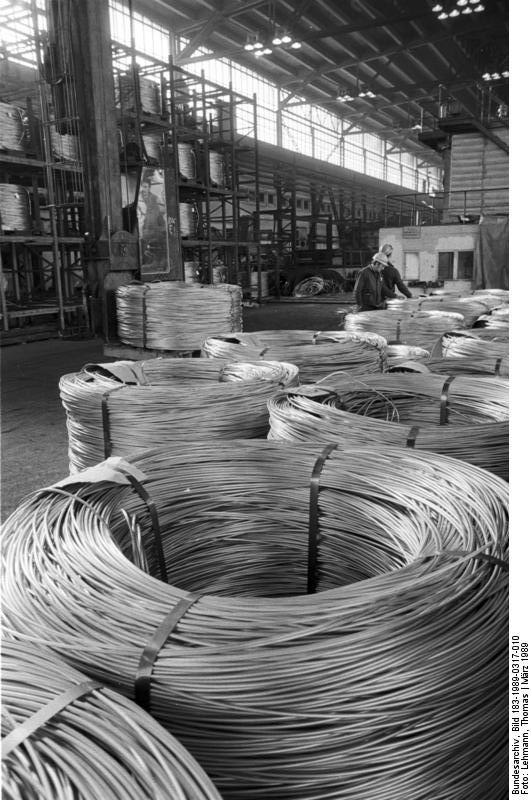 Hettstedt, Kupfer-Silbe-Hütte ADN-ZB/Lehmann 17.3.89 Bez. Halle: Wahlbilanz Hochwertiges Vormaterial für die weitere Veredlung beispielsweise zu Fein- und Feinstdrähten für die Elektronik und Elektrotechnik wird auf der in der DDR einzigartigen Draht- Gieß-Walzanlage in der Kupfer-Silber-Hütte "Fritz Beyling" Hettstedt produziert. Dieser auf acht Millimeter Stärke gewalzte Kupfergießdraht ist das Ergebnis des dort ablaufenden metallurgischen Prozesses. In den zurückliegenden fünf Jahren konnte die Produktion der 1979 in Betrieb genommenen Anlage nahzu verdoppelt werden.